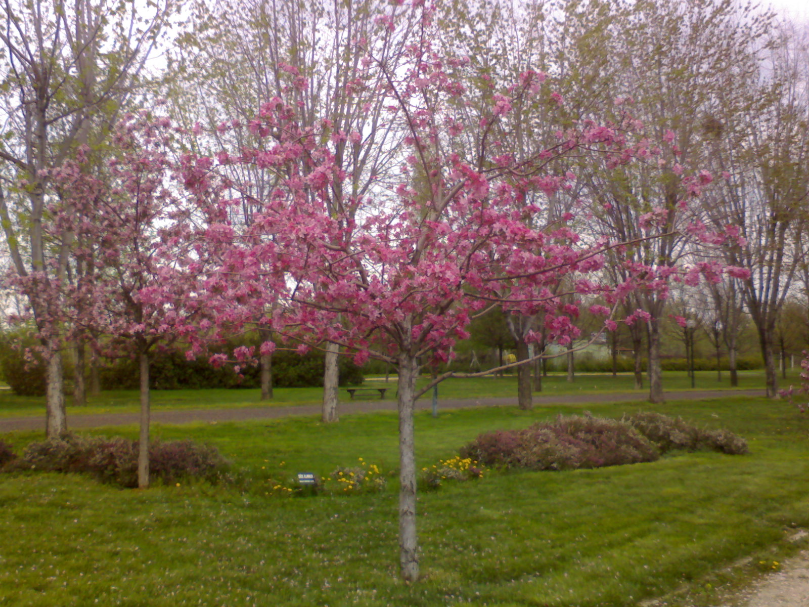 süs elması_malus purpurea